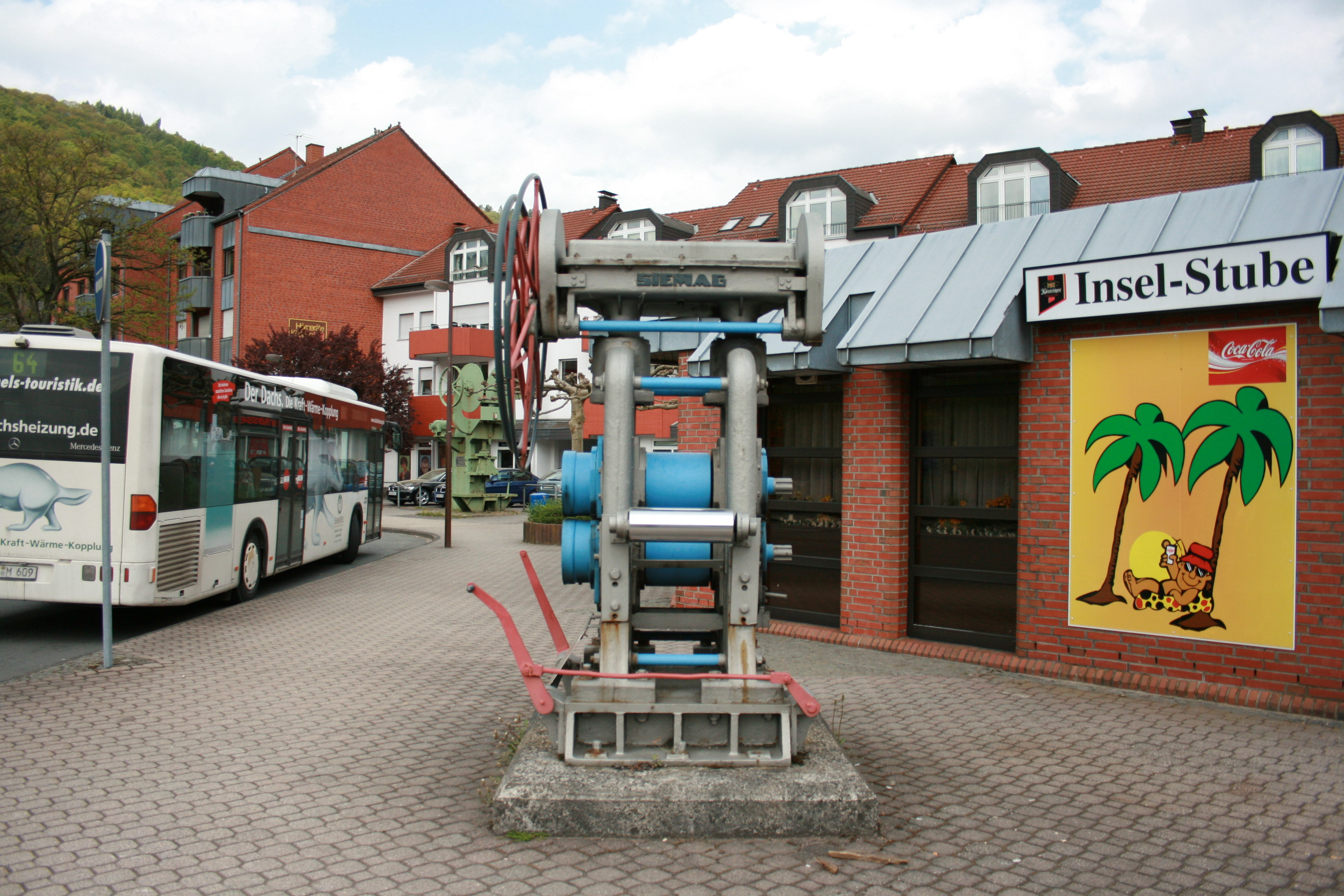 Bahnhofsplatz in Werdohl